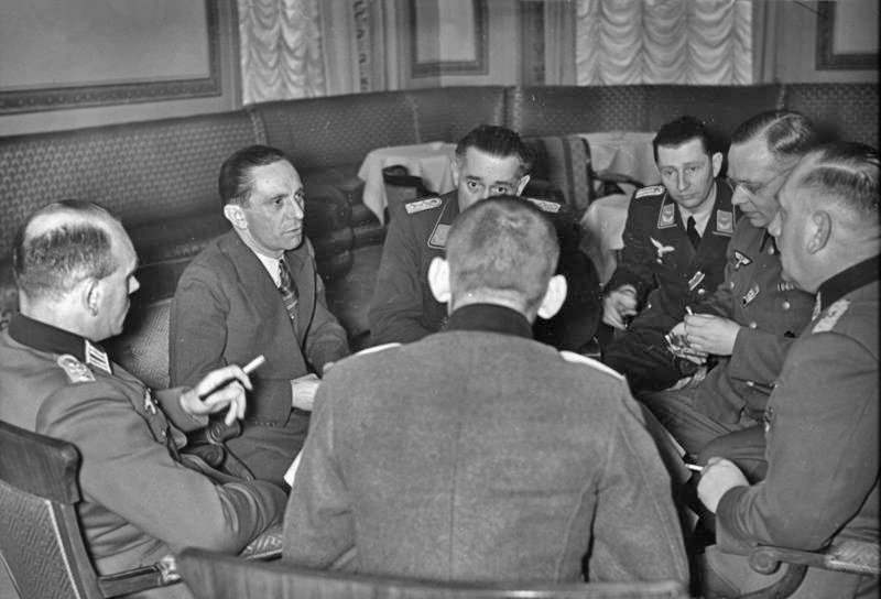 Berlin, PK-Führer bei Joseph Goebbels II. Weltkrieg 1939-45. Dr. [Joseph] Goebbels empfing die Chefs der Propagandakompanien der drei Wehrmachtsteile im Propagandaministerium in Berlin. Reichsminister Dr. Goebbels empfing am 28.1.1941 die zu einem Lehrgang in Berlin weilenden Chefs der Propaganda- [gestrichen: und Kriegsberichterkompanien des Heeres, der Kriegsmarine und der Luftwaffe] Kompanien der drei Wehrmachtsteile. In längeren Ausführungen gab er ihnen ein umfassendes Bild der militärischen und politischen Lage sowie Richtlinien für die aktuelle Arbeit der Propaganda-Kompanien. UBz: Reichsminister Dr. Josef Goebbels im Gespräch mit den Kompaniechefs. Scherl Bilderdienst, Berlin KG AV 62090 29.1.41 "Fr" OKW [Chefs der Propagandakompanien der Wehrmacht bei Goebbels; ganz rechts (im Profil) Hasso von Wedel] Abgebildete Personen: Goebbels, Joseph: Reichsminister für Volksaufklärung und Propaganda, Gauleiter Berlin, Deutschland Wedel, Hasso von: Oberstleutnant, Leiter der Pressetruppe im Oberkommando der Wehrmacht, Deutschland (GND 117206008)